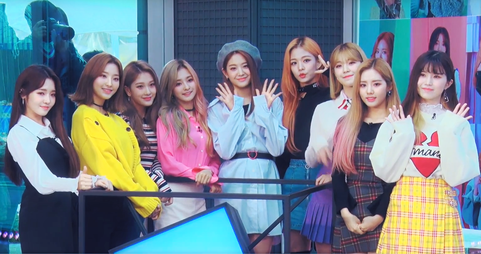 "미소에 반하다"···fromis_9, 과즙미 팡팡 터지는 매력 #프로미스나인 #fromis_9